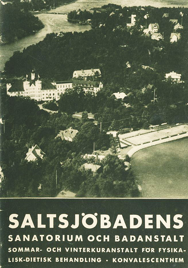 Saltsjöbadens sanatorion och Badanstalt reklambroschyr